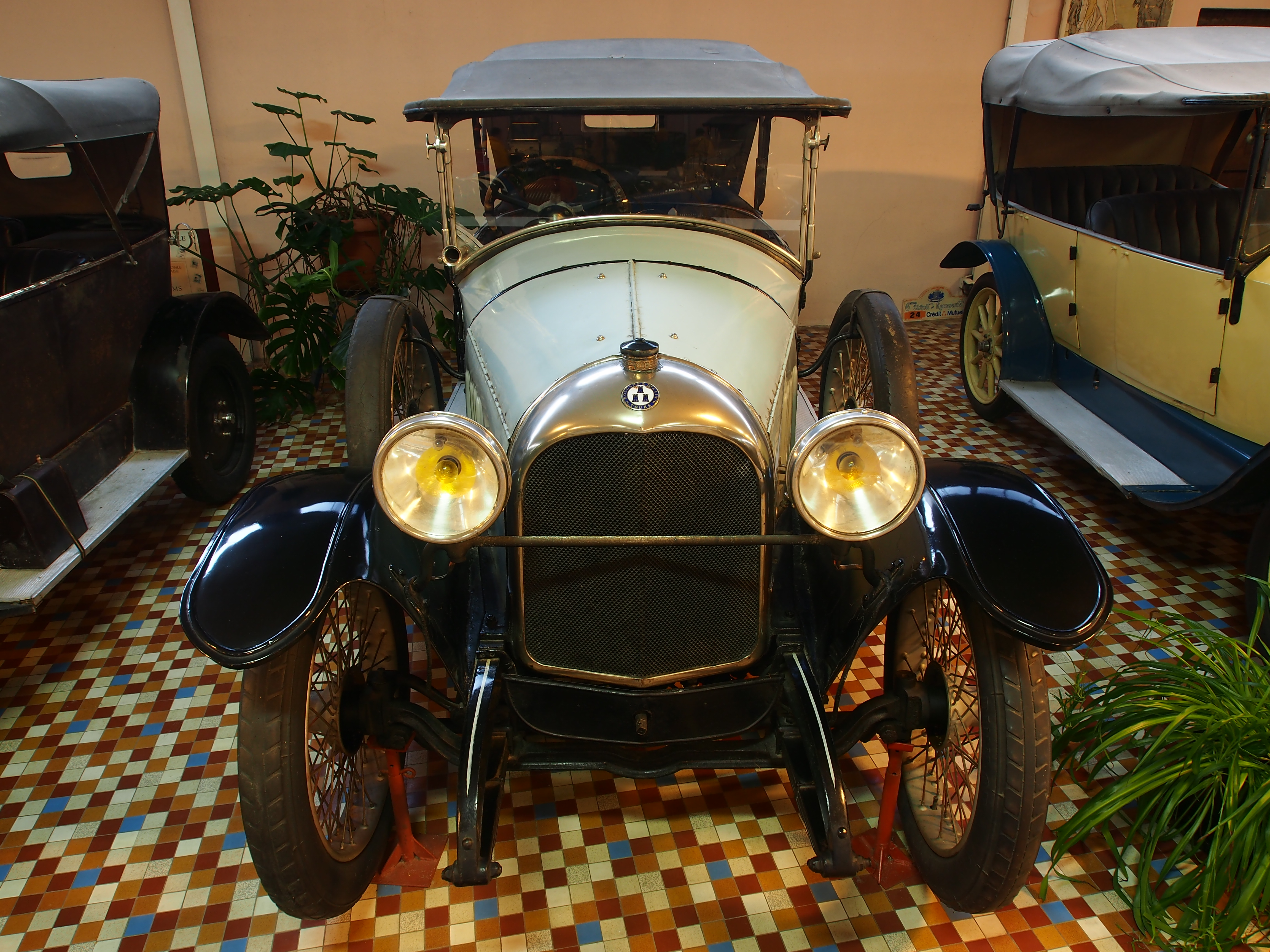 Photographed at the Musée Automobile de Vendée, France.